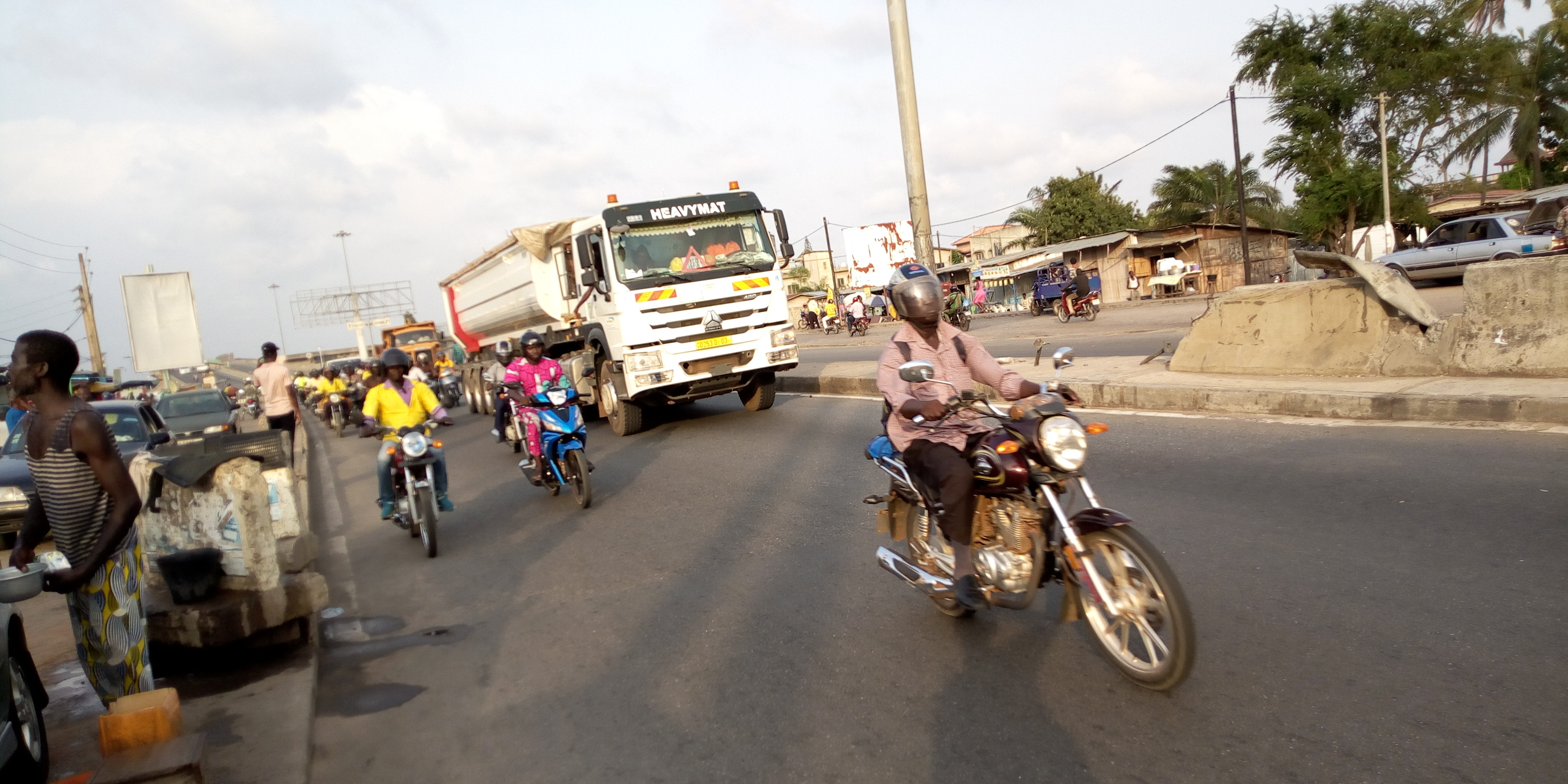 Sortie de la circulation sur l'échangeur de godomey en sens inverse This is an image with the theme "Africa on the Move or Transport" from: Benin